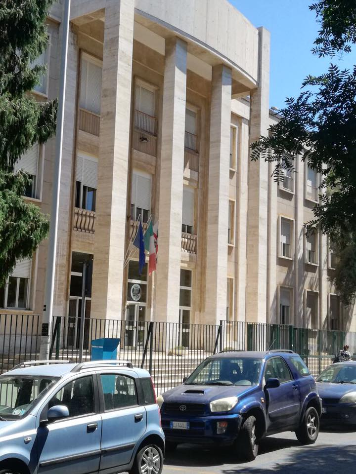 facciata dettori lato sinistro